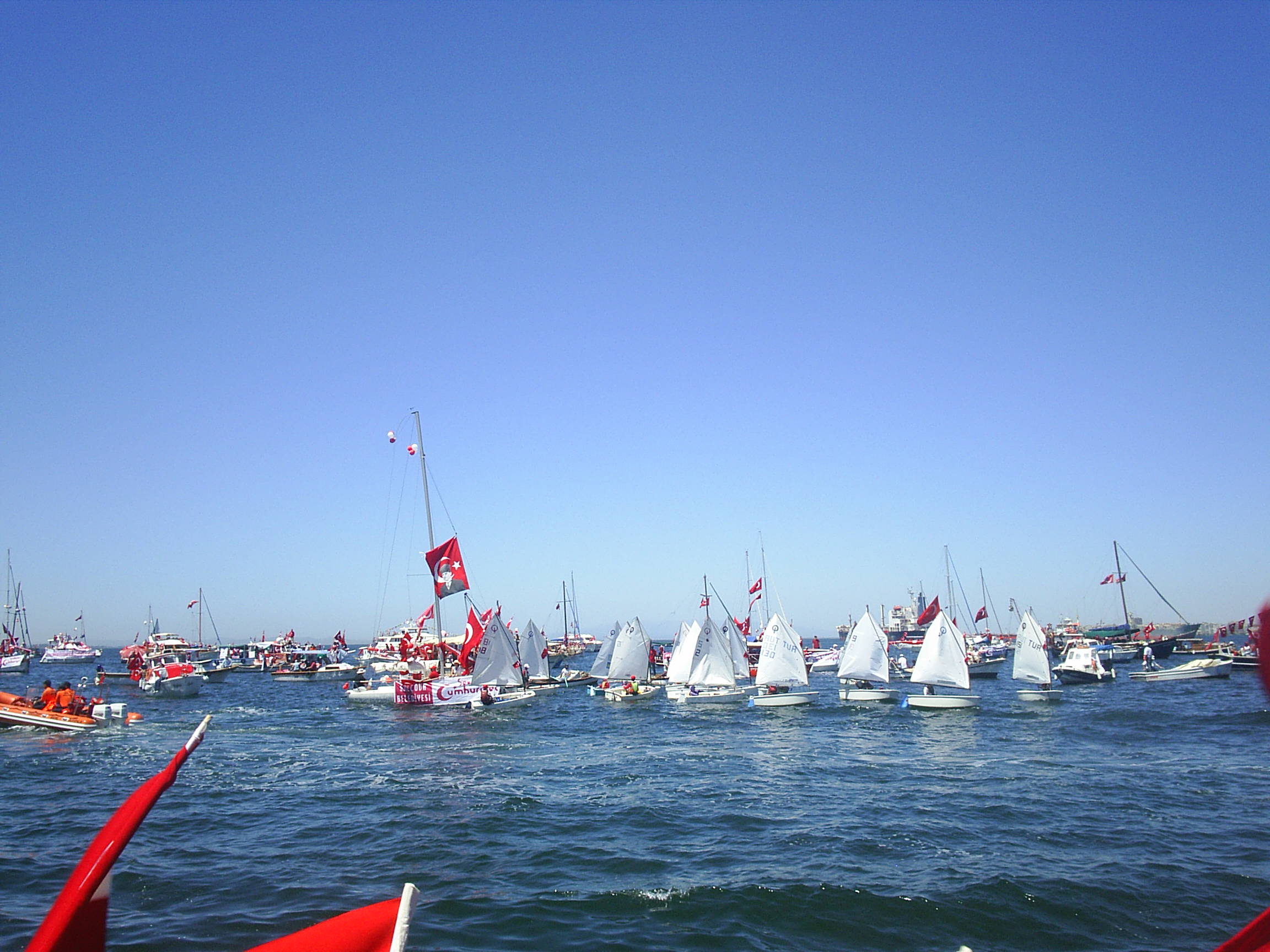 Protect Your Republic Protest, Gündoğdu square, İzmir